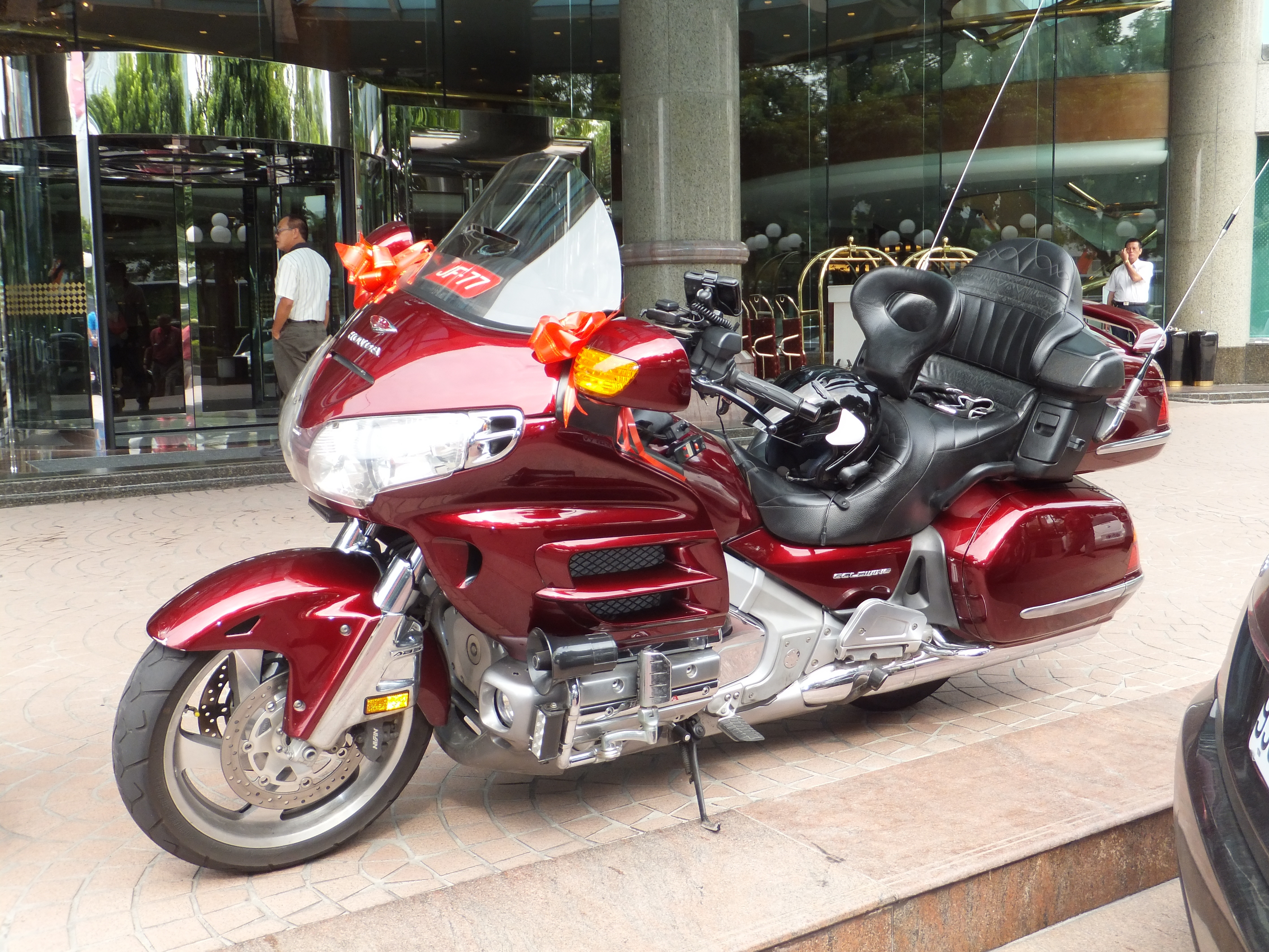 停放於長榮桂冠酒店（臺中）前的婚禮前導重型機車隊Honda Goldwing重型機車JF-77。